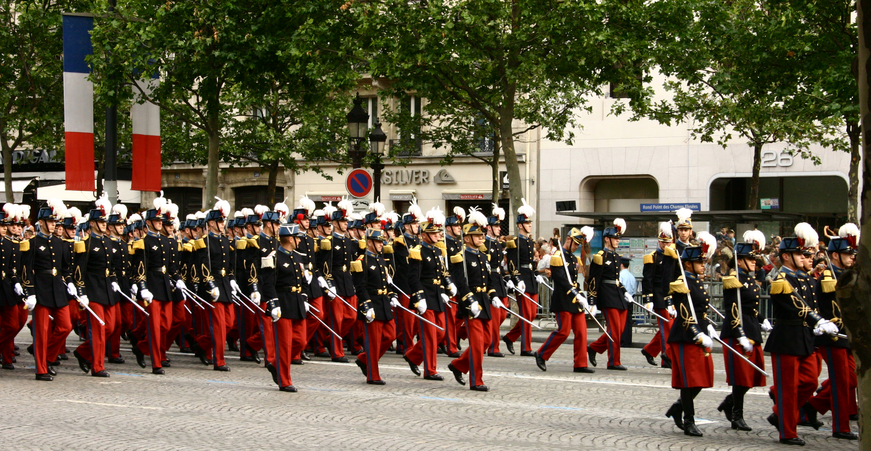 Saint-Cyriens le 14 juillet 2007 sur les Champs élysées à Paris. Un lieutenant a des soucis avec son sabre (devant l'arrêt de bus).